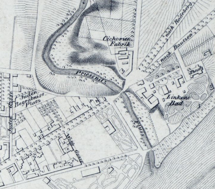 Ausschnitt Prießnitz aus: Lesch, Heinrich Grundriss von Dresden nach der neuesten Aufnahme, 1:9 000, Lithographie, 1828